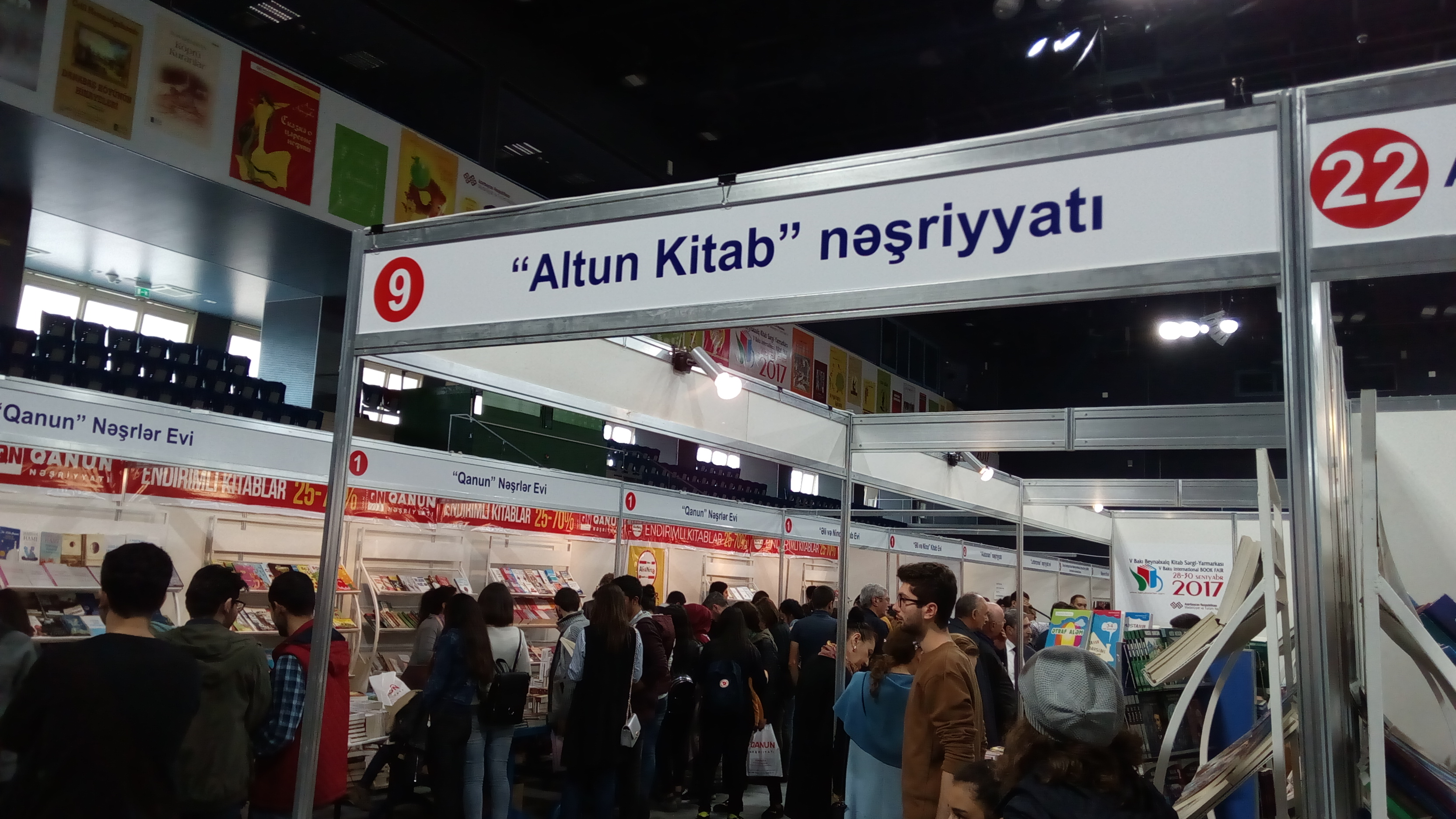 V Bakı Beynəlxalq Kitab Sərgi-Yarmarkası